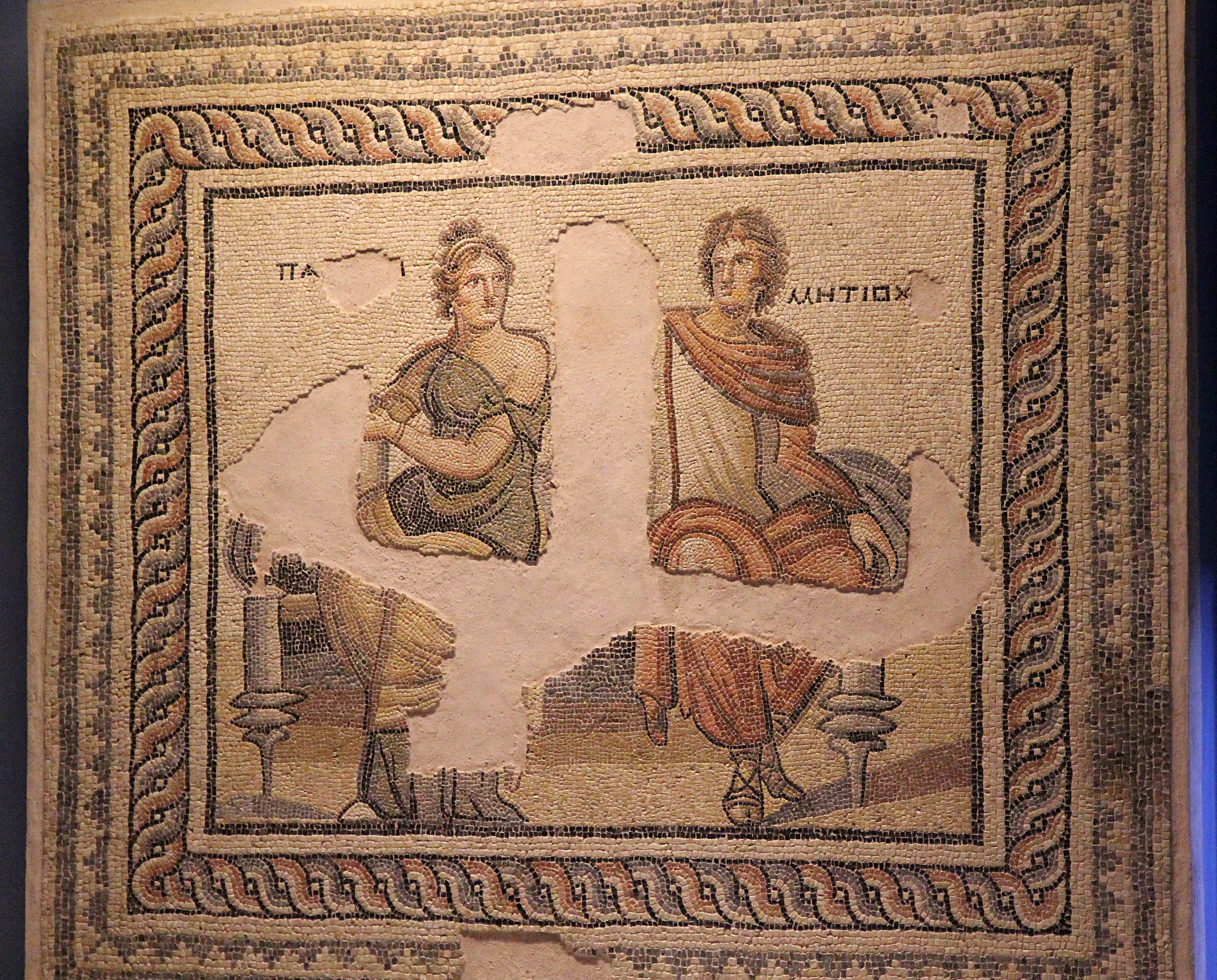 Zeugma-Mosaik-Museum, Gaziantep, Türkei, Metiochos und Parthenope